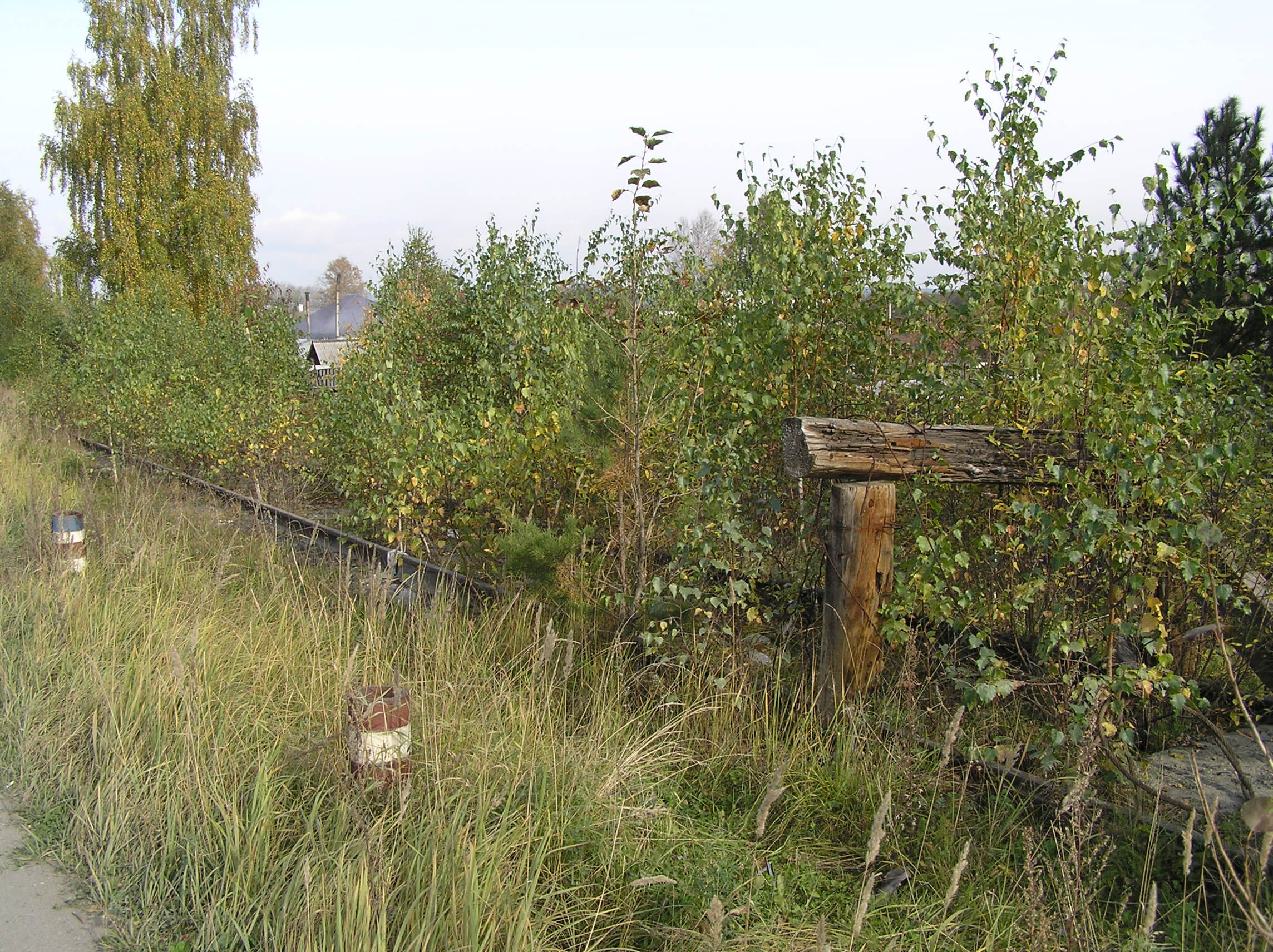 Тупик разобранной ветки Подволошная - Заводская (Ревда)